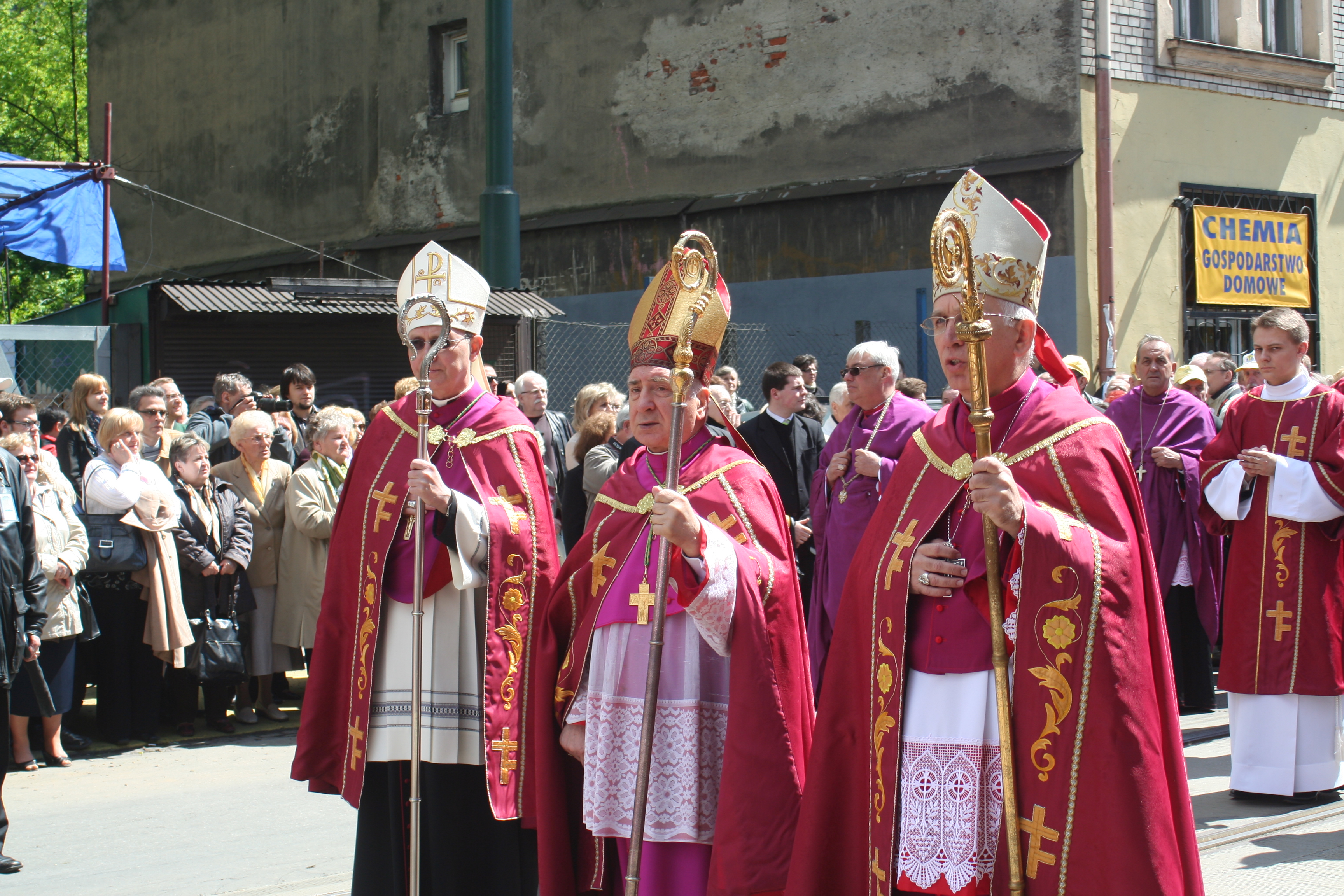 Tradycyjna Procesja ku czci św. Stanisława z Wawelu na Skałkę.